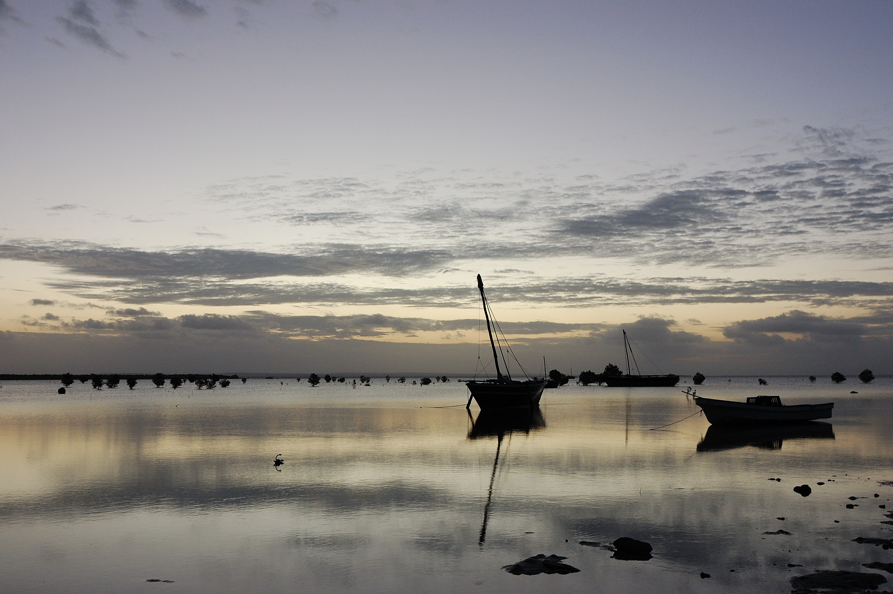 Ilha do Ibo, Moçambique [2009]